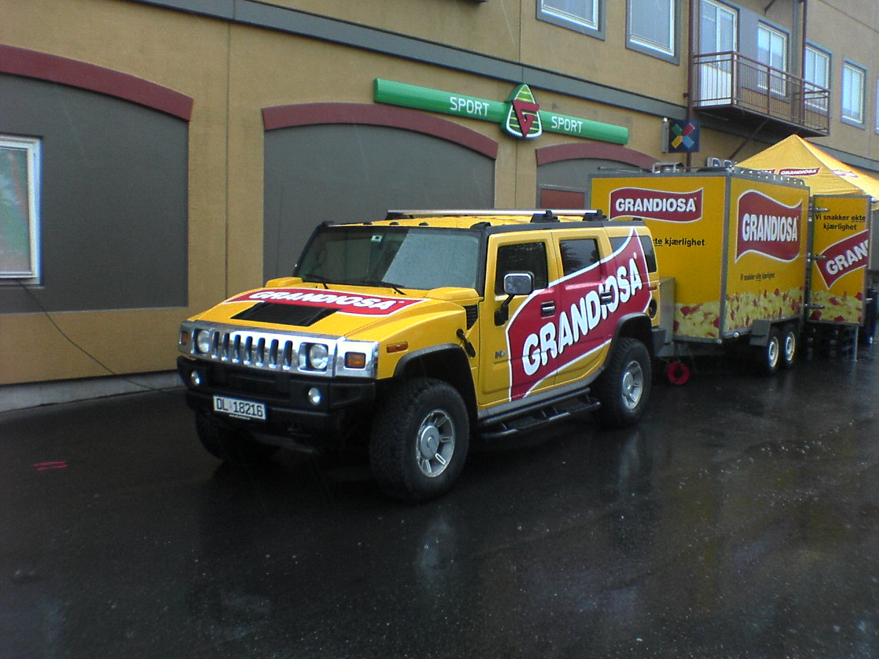 Hummer H2. Grandiosa.